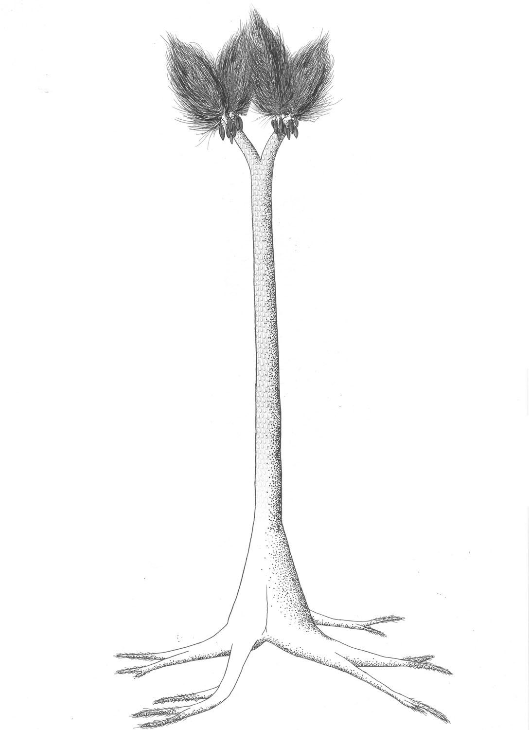 Reconstrucción del vegetal fósil Sigillaria a partir de los restos fósiles conocidos.